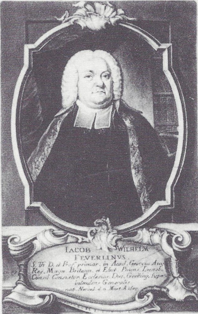 Schwarz-weiß-Kopie eines Ölgemäldes von Jakob Wilhelm Feuerlein (1689-1766)